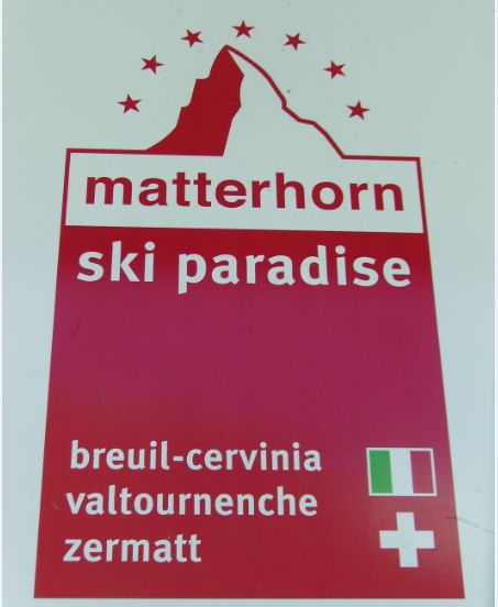 Logo del Matterhorn Ski Paradise